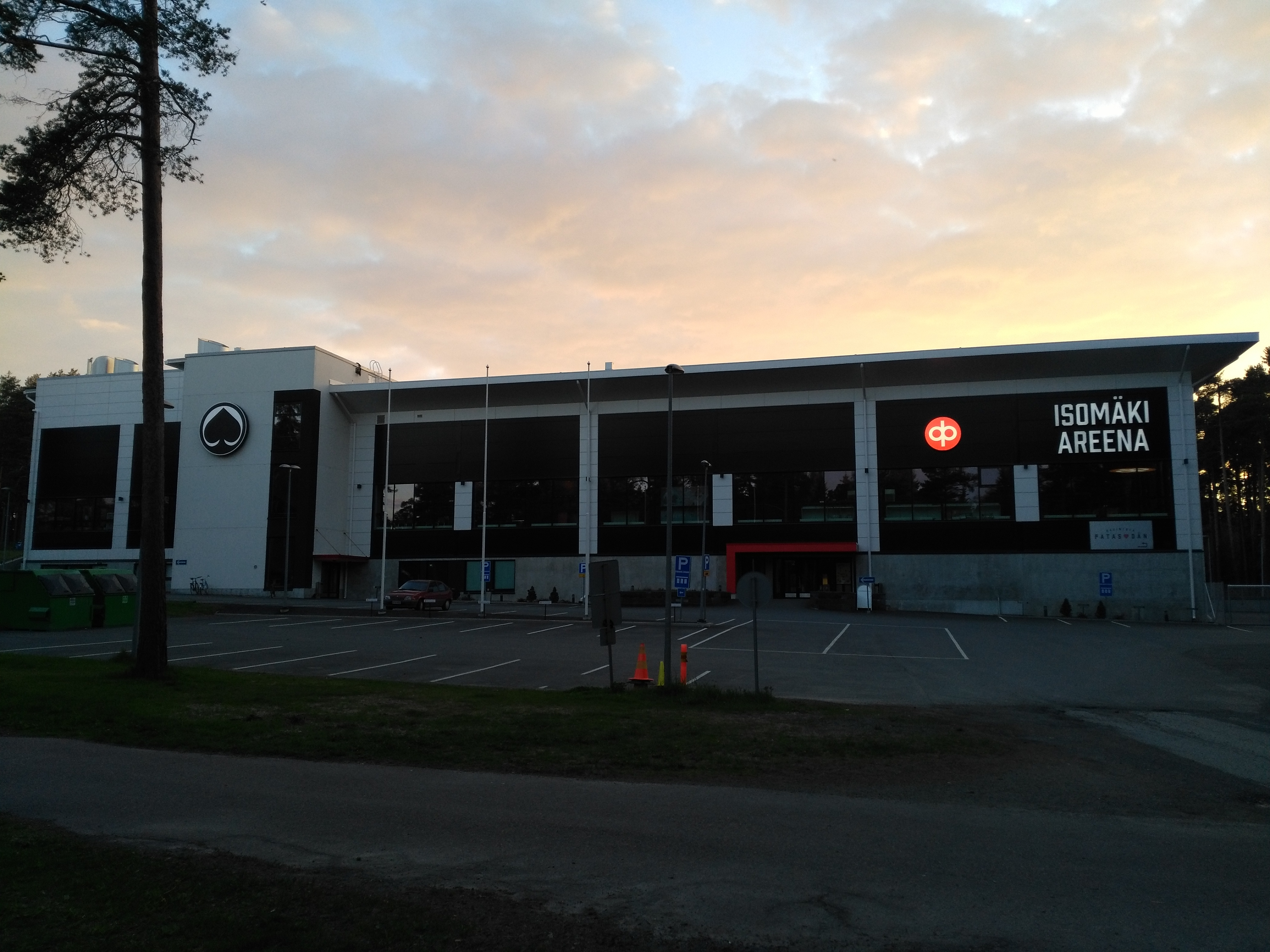 Isomäki Areena (pääty)